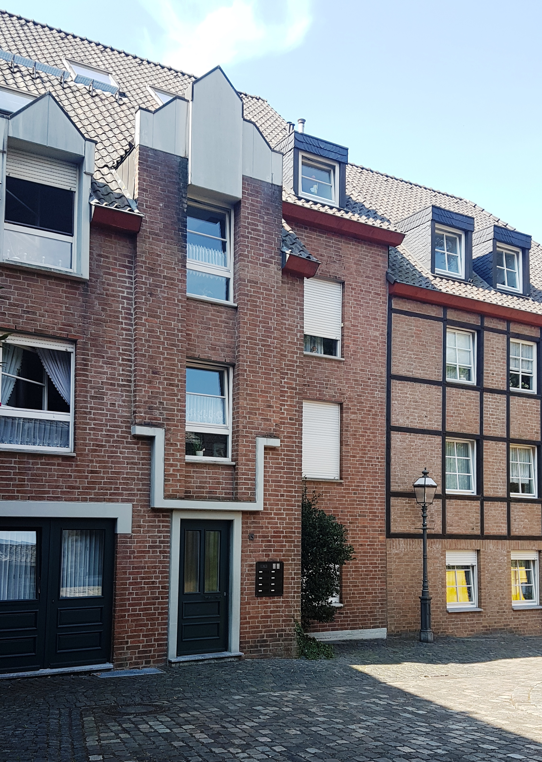 Ort in Stolberg, an dem der Geburtshaus von Heinrich Grüber stand